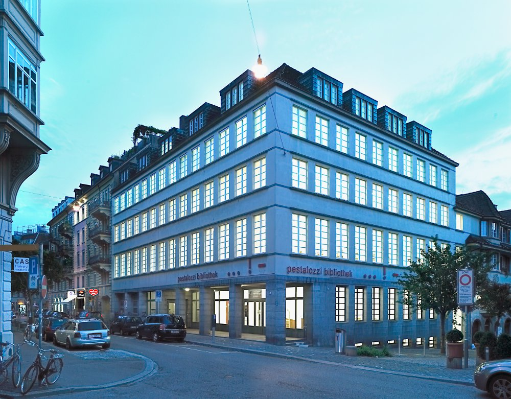 Pesstalzzi-Bibliothek Zürich, Bibliothek Altstadt